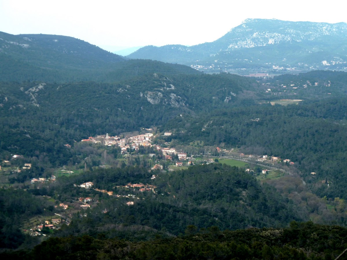 Méounes-lès-Montrieux, Var, France